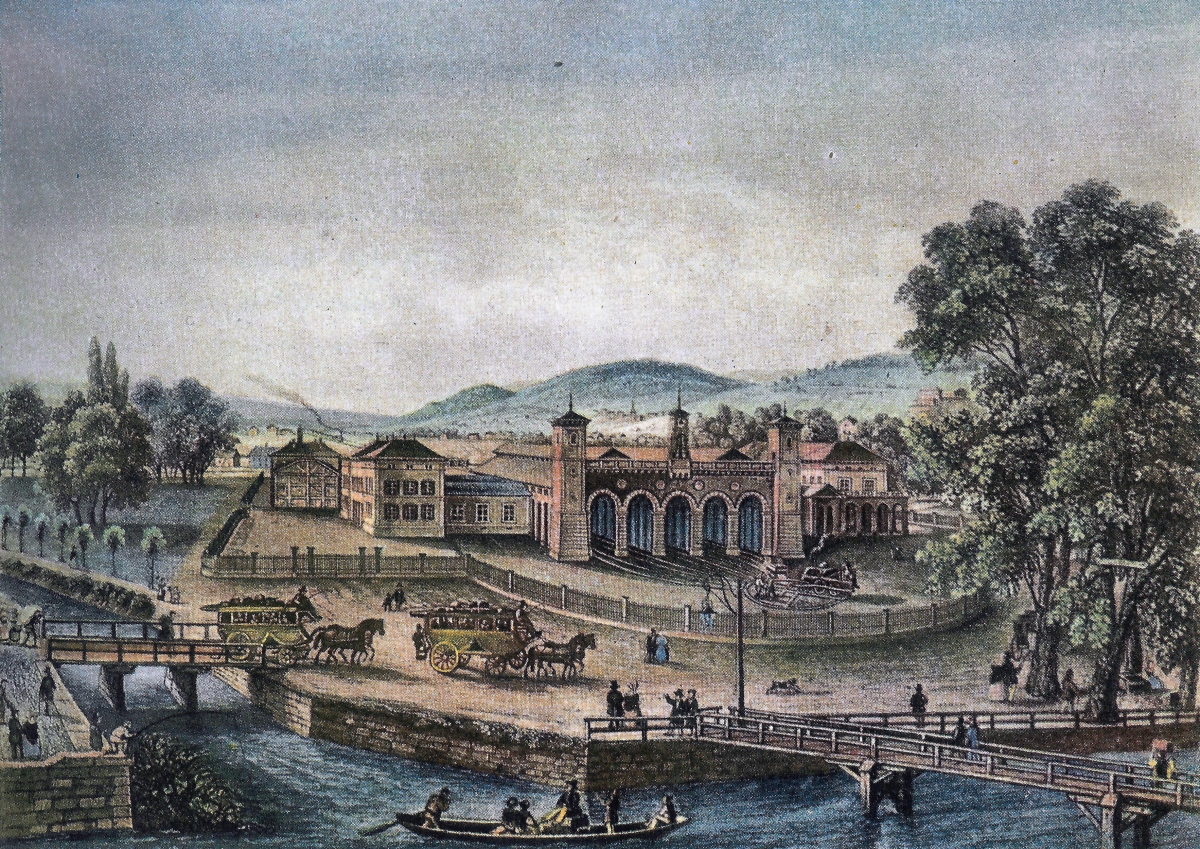 Bahnhof Zürich 1847